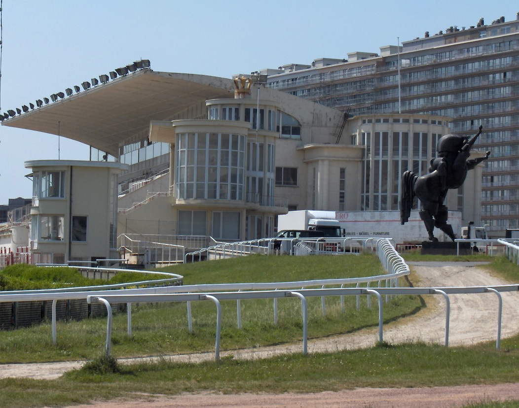 Wellingtonrenbaan - Ostend, Belgium Grandstand with royal box